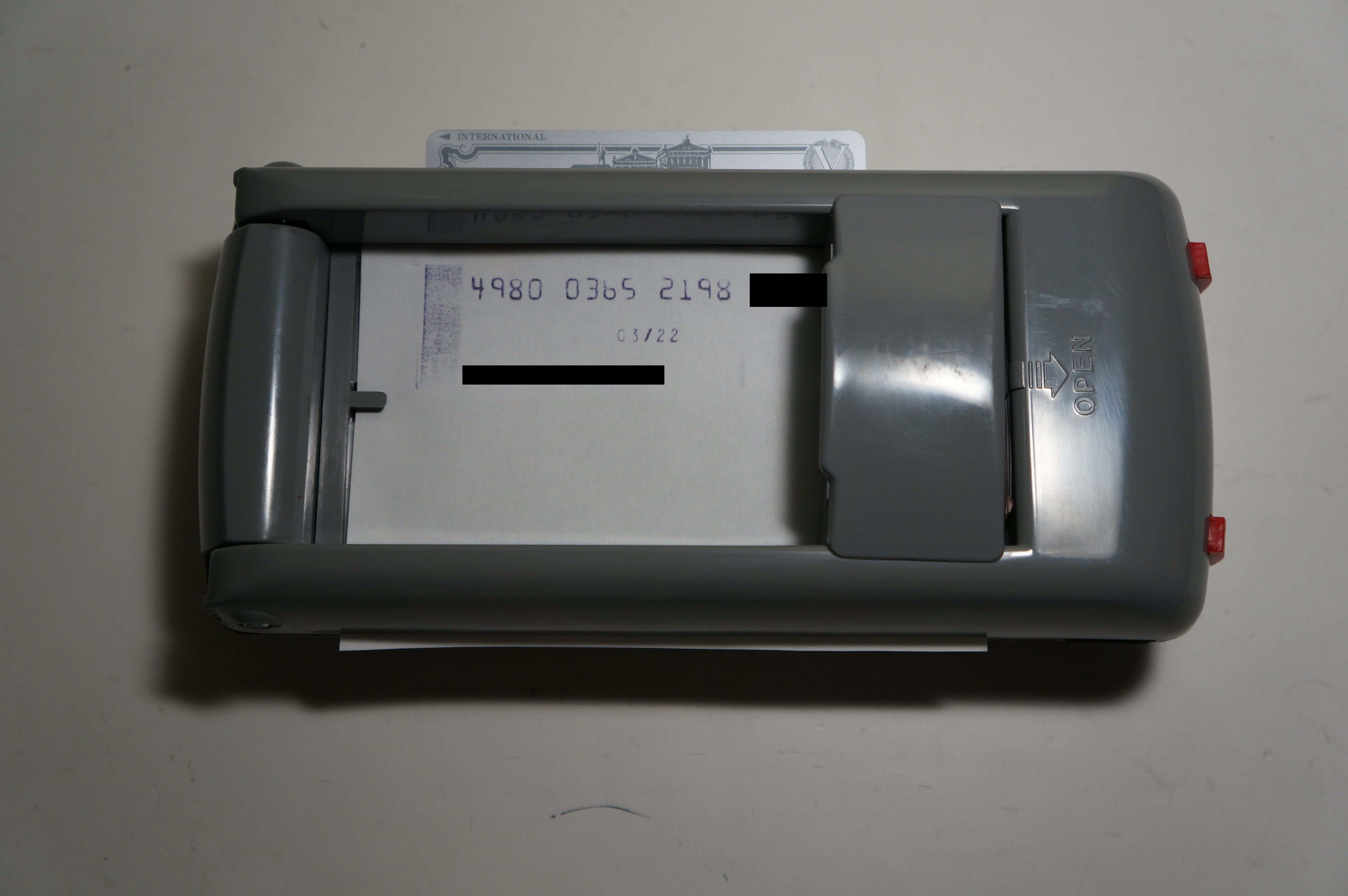 ジャノメクレディア製のインプリンター M-220